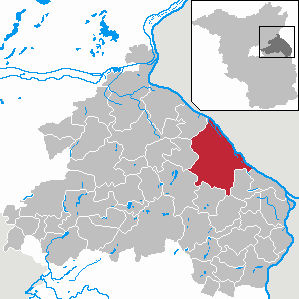 Letschin in Brandenburg (Country) - District Märkisch-Oderland